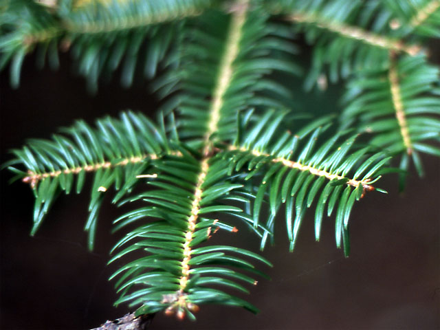 Hojas de Abies firma. Foto por usario Inti-sol en Mt. Takao de Tokyo, septirmbre de 2006. モミの葉。2006年9月、東京・高尾山にて撮影